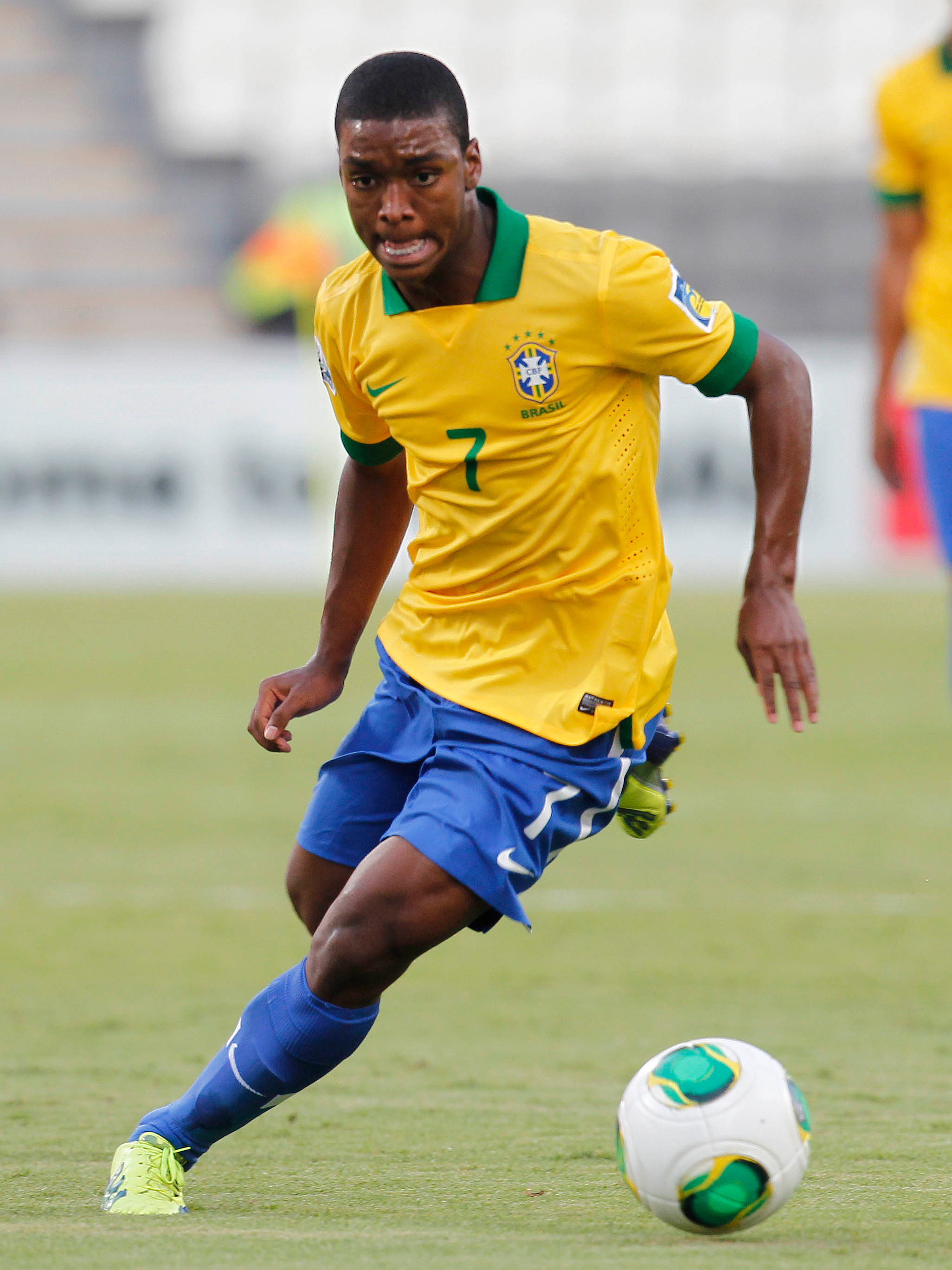 caio rangel